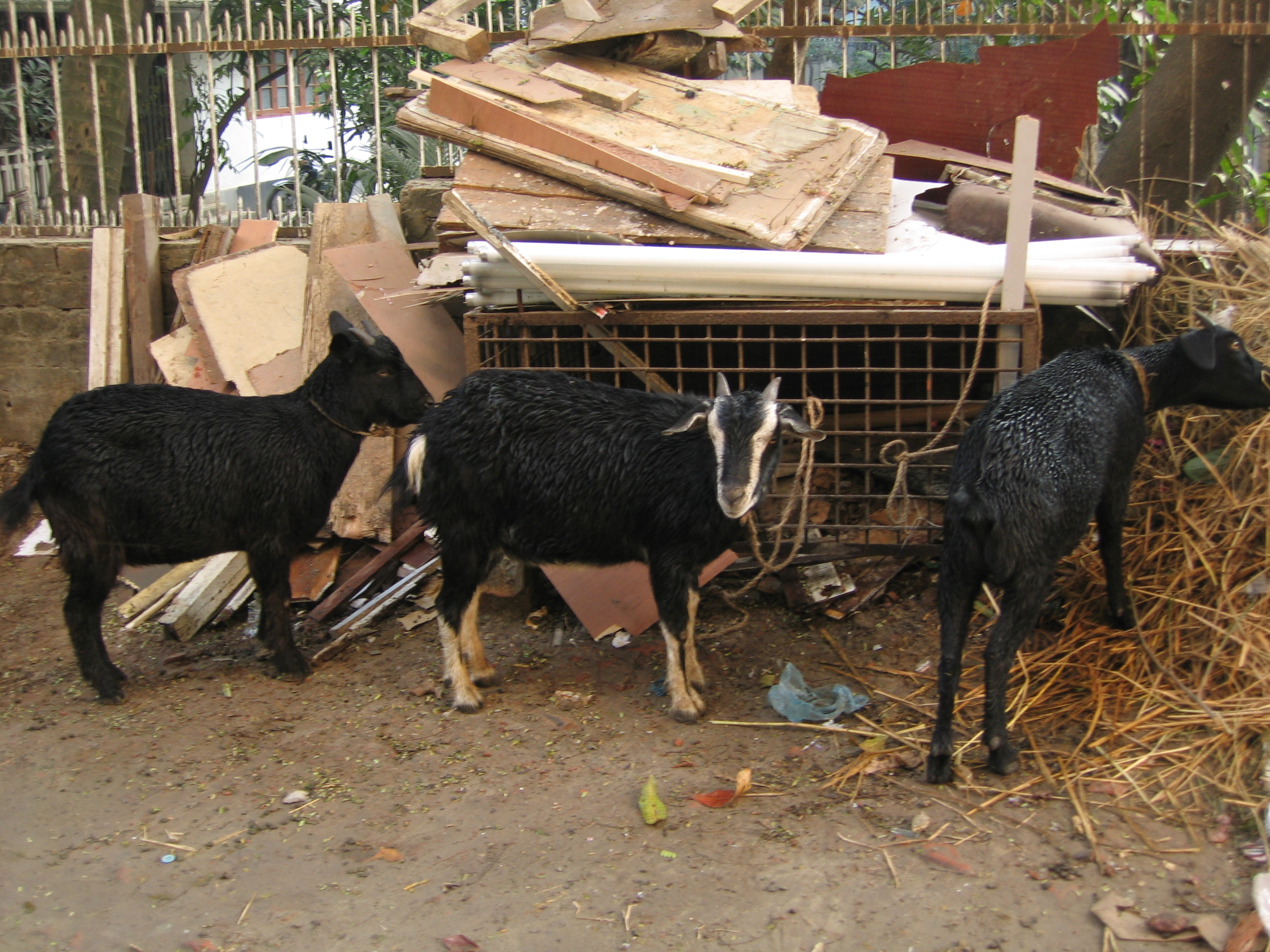 Black Bengal goats for Eid ul Adha, Dhaka, Bangladesh